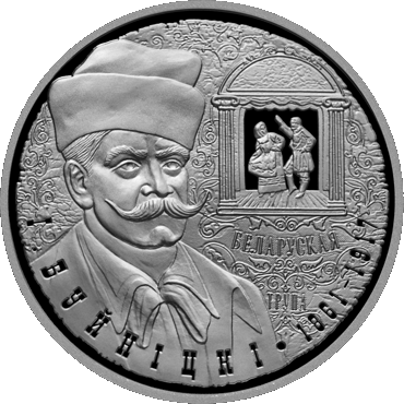 Беларуская (тарашкевіца): Памятная манэта «Ігнат Буйніцкі. 150 гадоў».